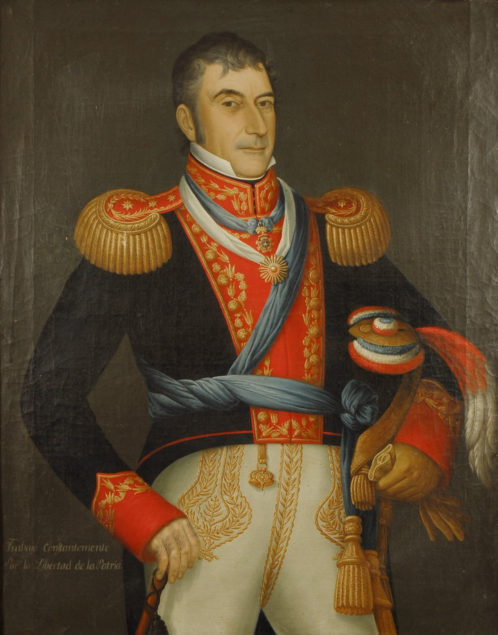 Mariscal de Campo Luis de la Cruz y Goyeneche (Chile)